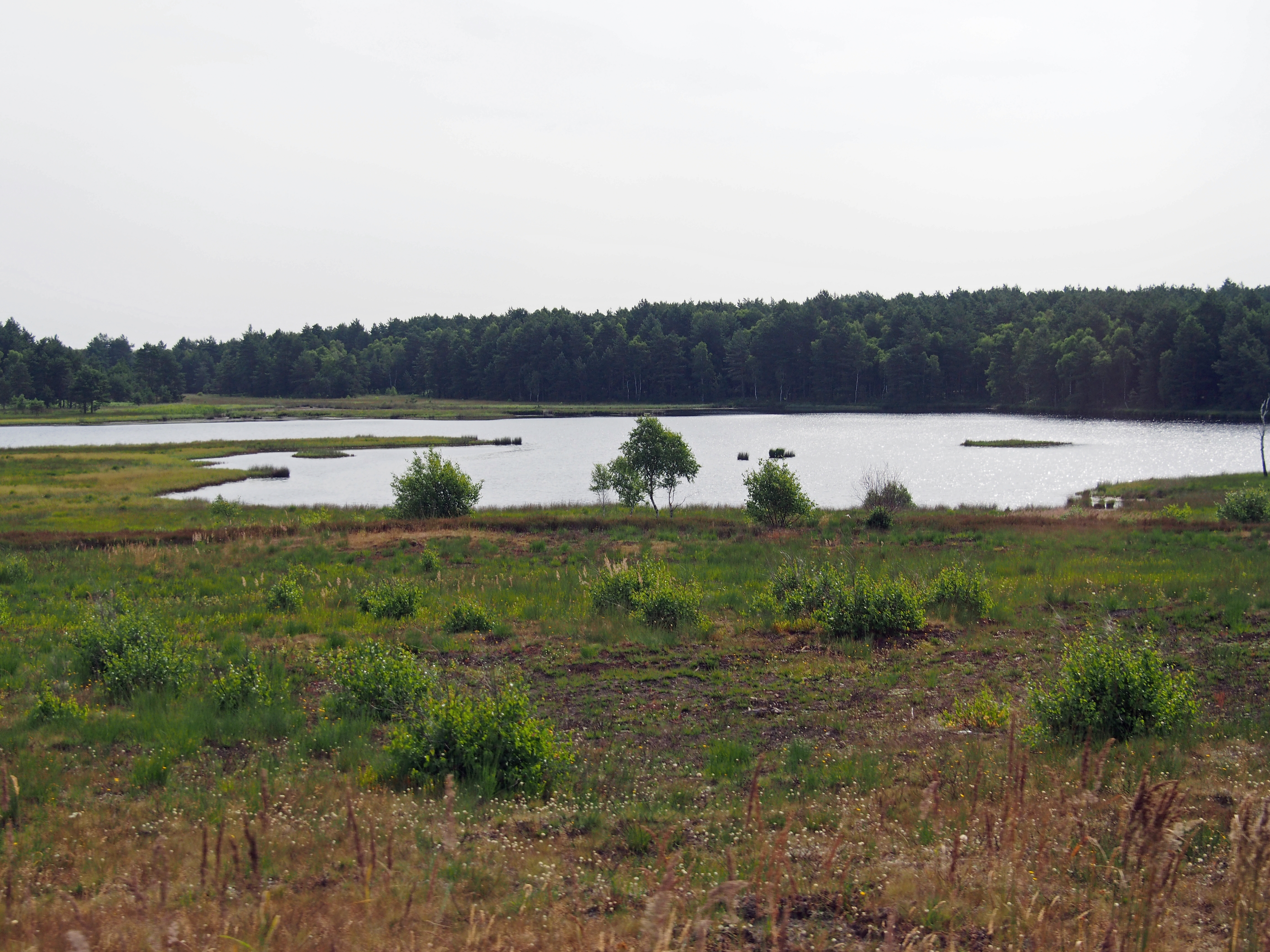 Der Meiersee an der Westgrenze des Gemeindefreien Bezirks Lohheide, auf dem Nato Truppenübungsplatz Bergen, Höhe 57 m über NN